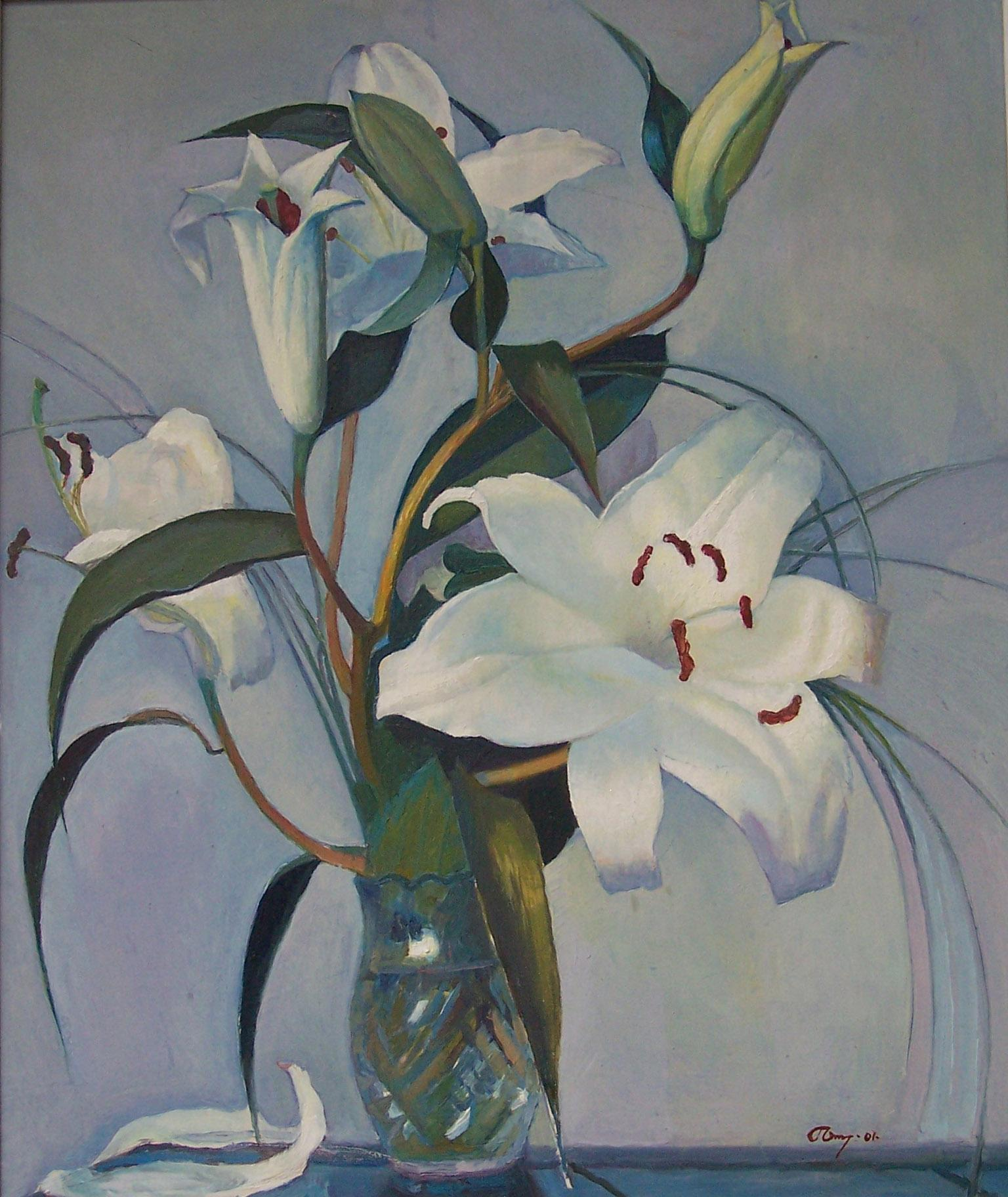 Лилии, 2001.